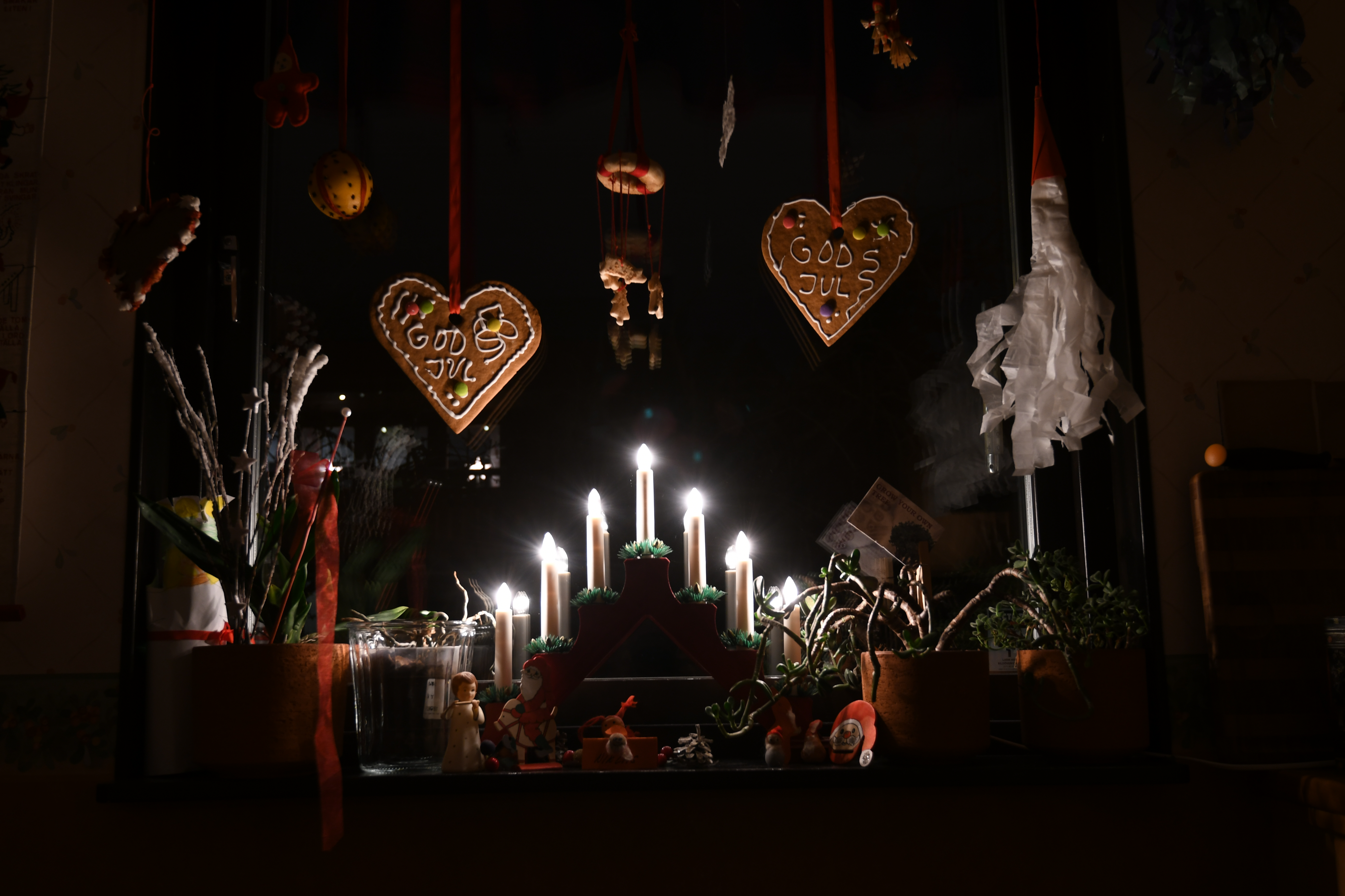 Julprytt fönster, Sverige, 2018.